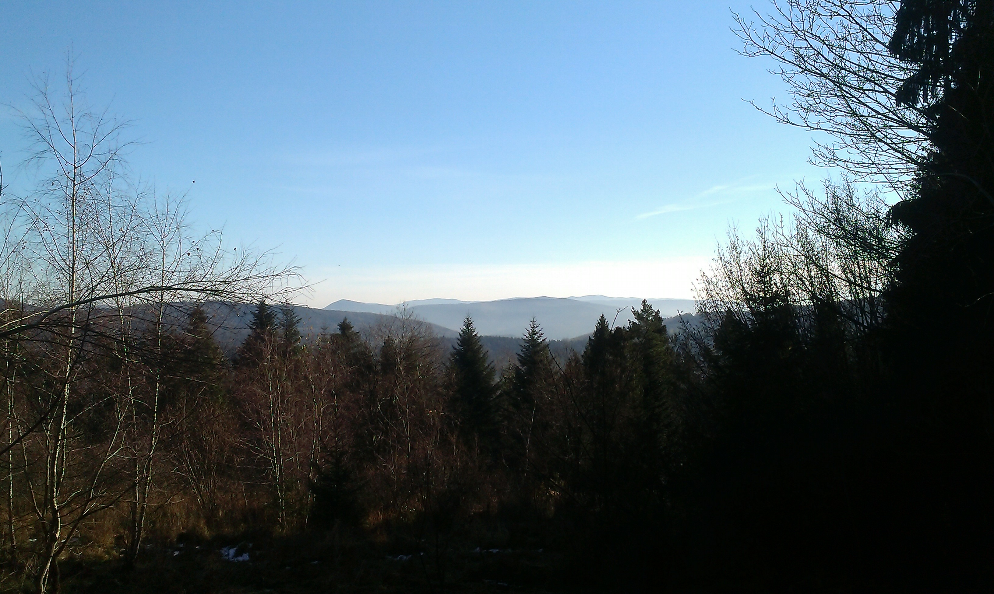 Widok ze szczytu w kierunku Lubonia Wielkiego